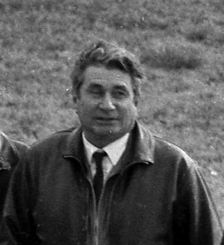 Hall de l'Aérogare Blagnac 1. 2 mars 1969. Vue d'ensemble en plongée du 1er équipage du Concorde (vue de face) de g. à d. : Henri Perrier (pilote), Jacques Guignard (pilote), André Turcat (directeur des essais en vol de Sud Aviation et pilote) et Michel Rétif (mécanicien). Cliché lors du 1er vol d'essai du Concorde.